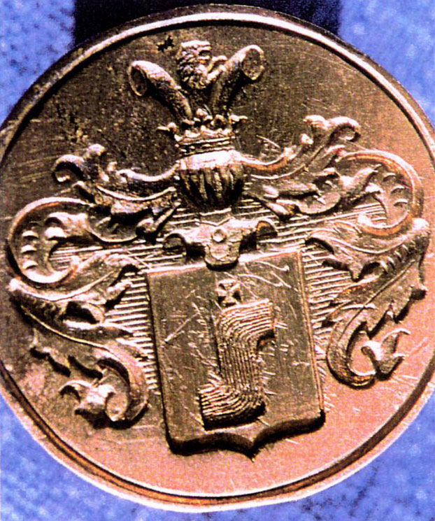 Chevalière de la famille Saloff (les Saloff de la Volga). Les Saloff de la région de Kaluga en ont une différente.